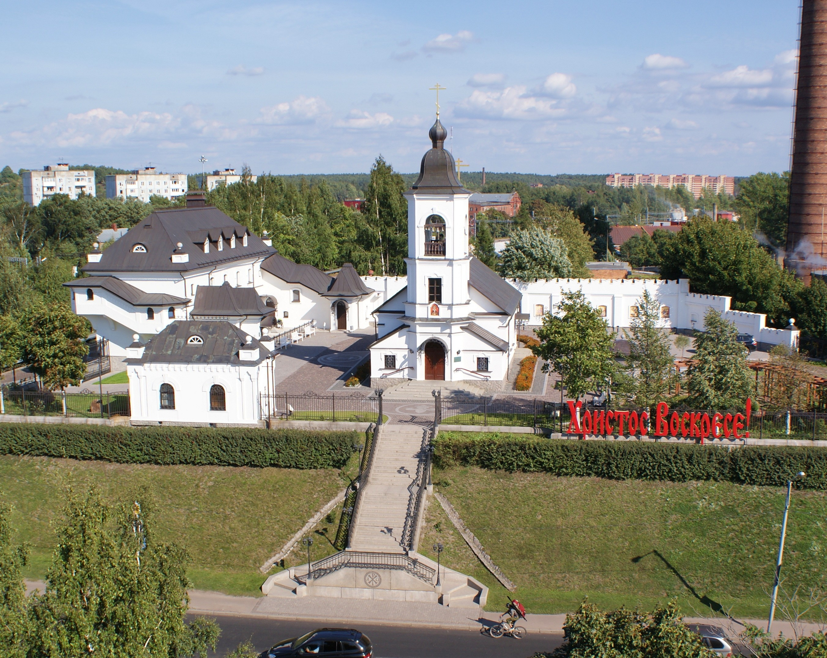 Вид на Ильинский храм в Выборге